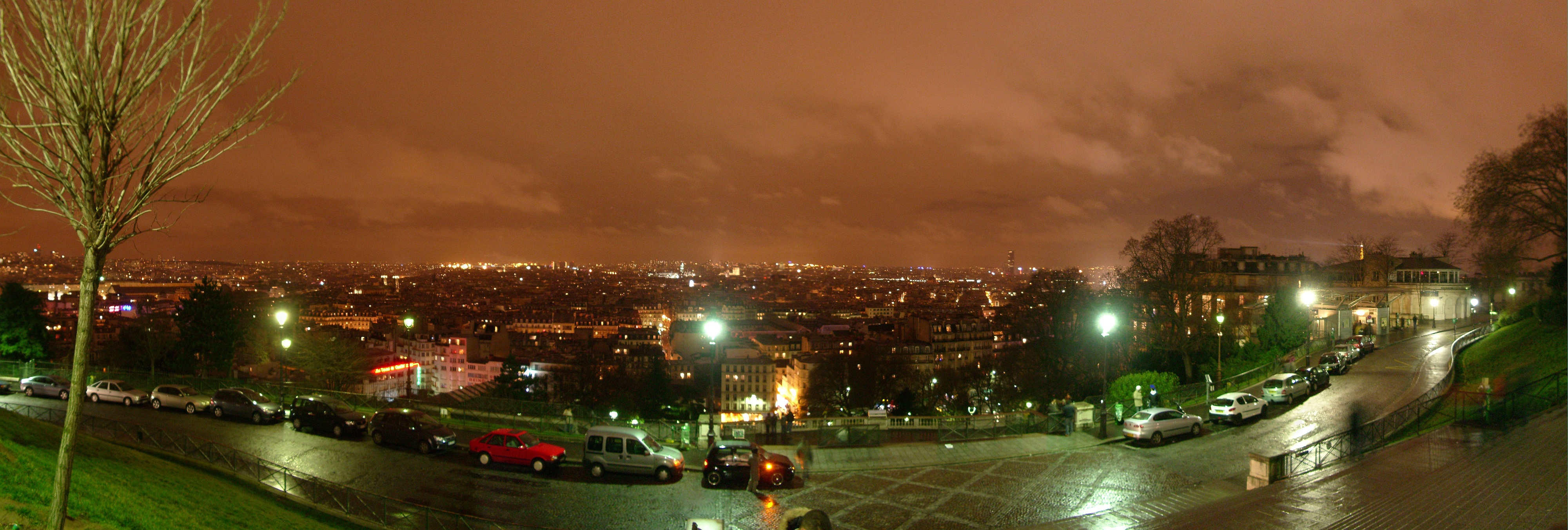 Aussicht vom Montmarte auf Paris bei Nacht (Blick nach Süden)